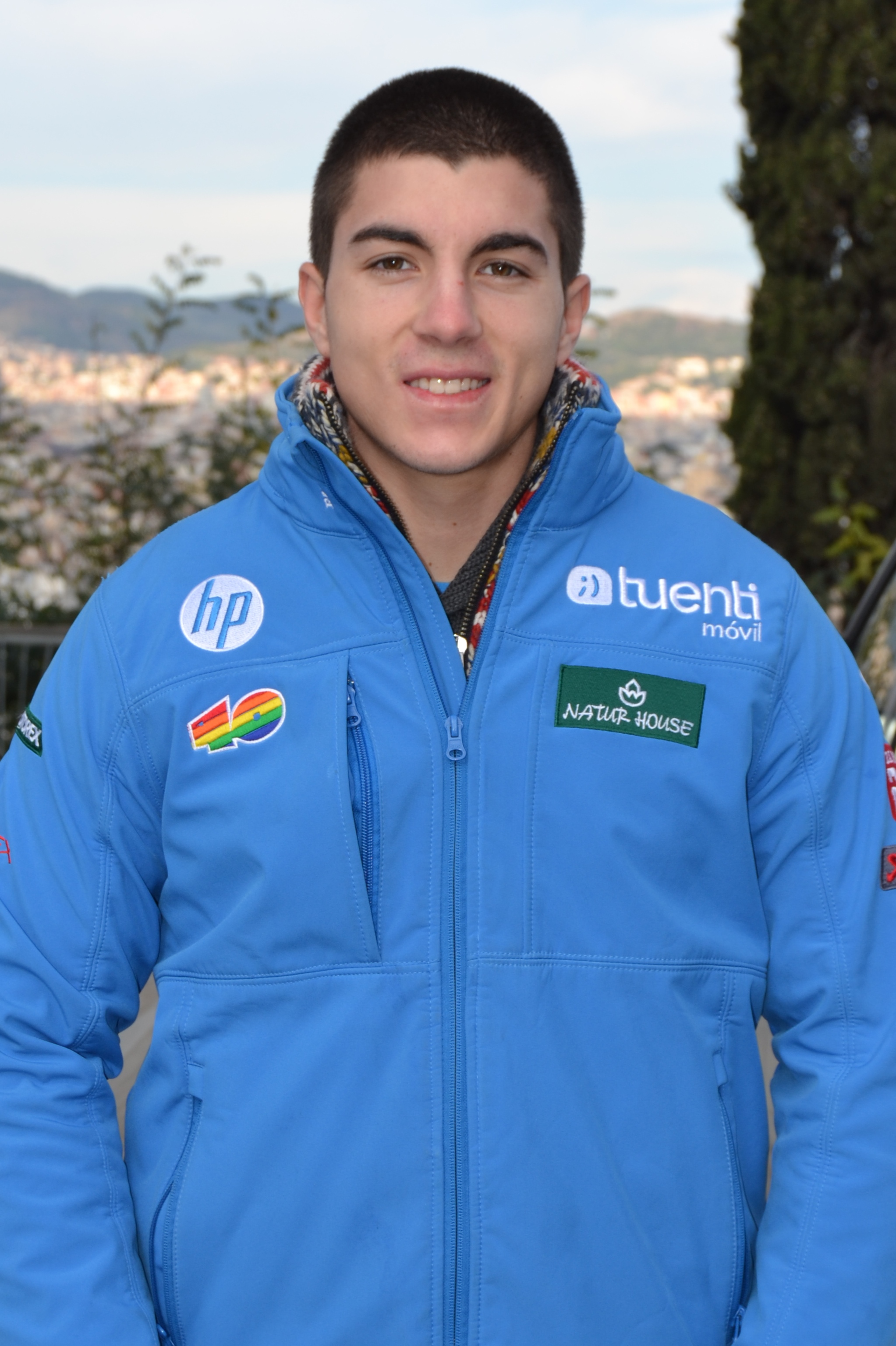 Maverick Viñales Ruiz, piloto de Moto2